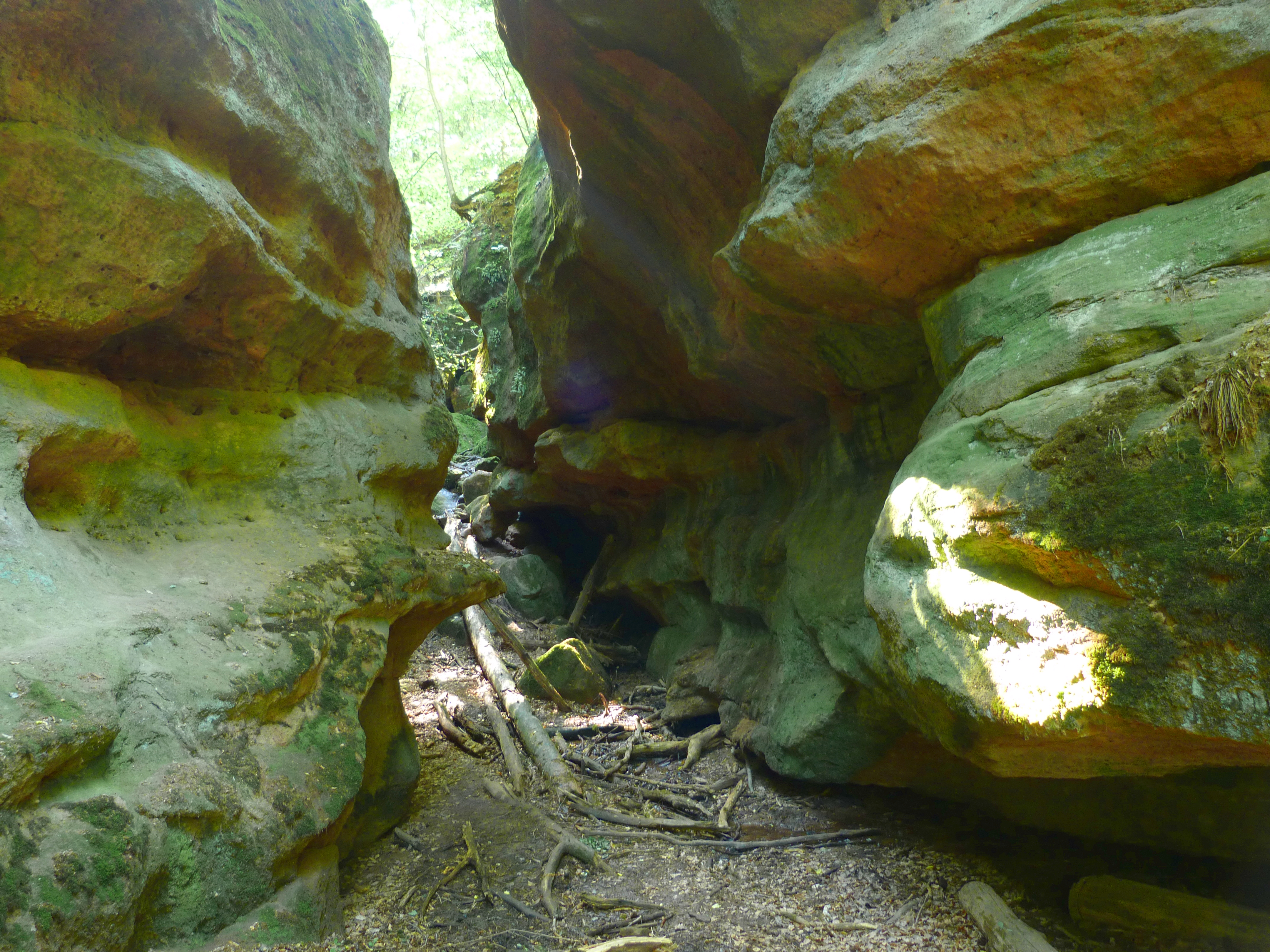 Im Schnittlinger Loch